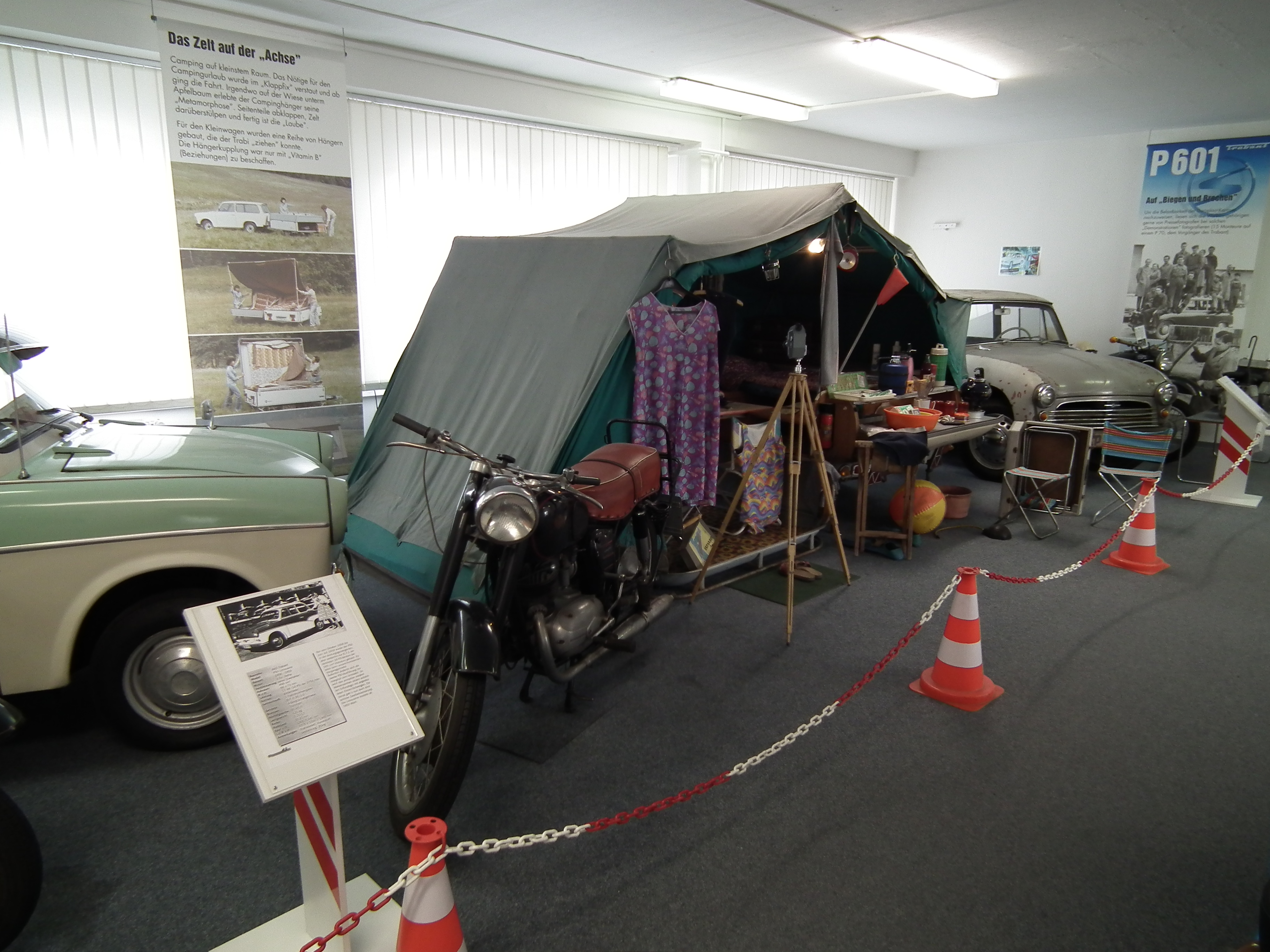 DDR-Museum Zeitreise in Radebeul, aufgebauter Klappfix